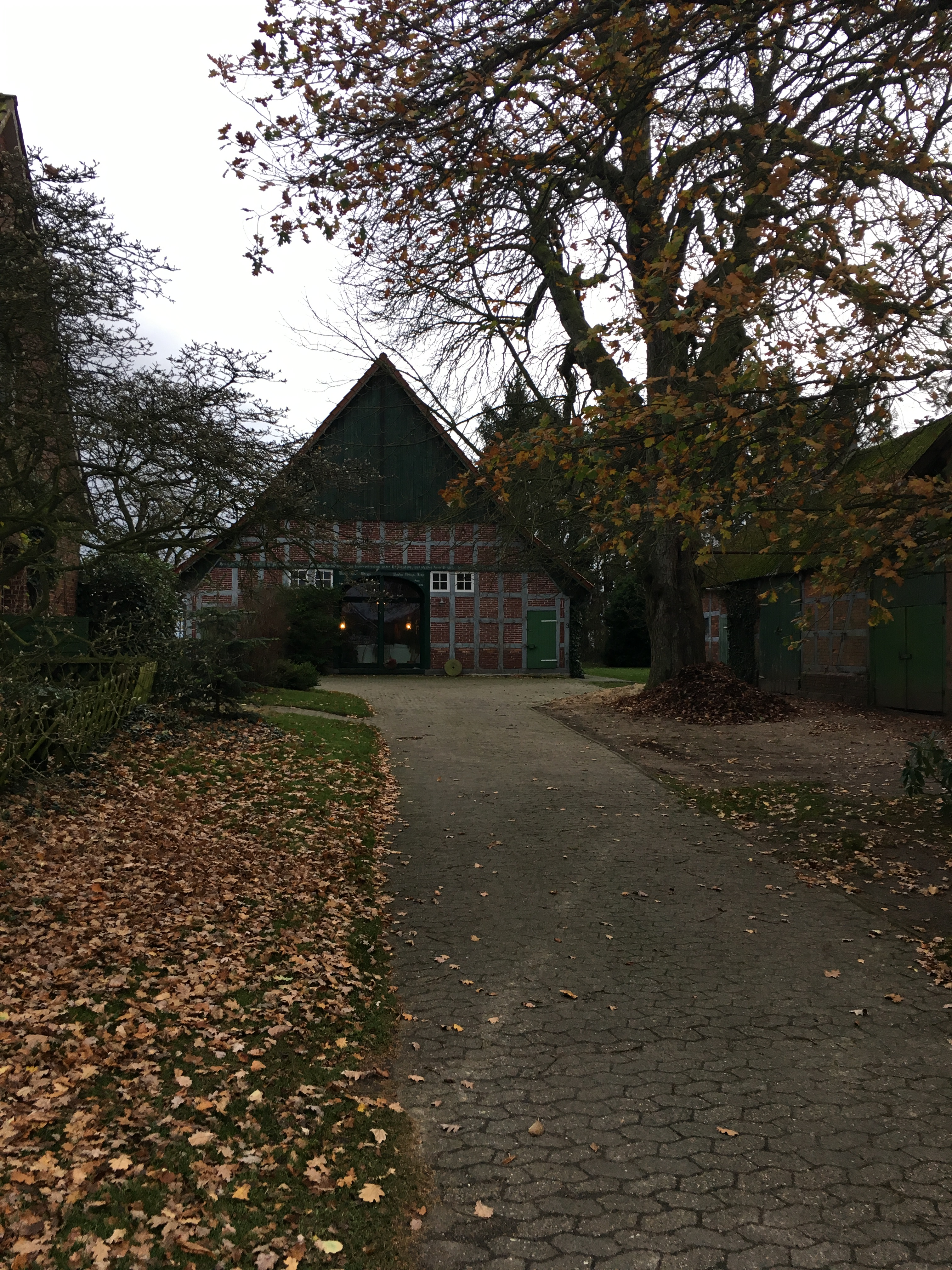 Fackwarkhuus in Öös